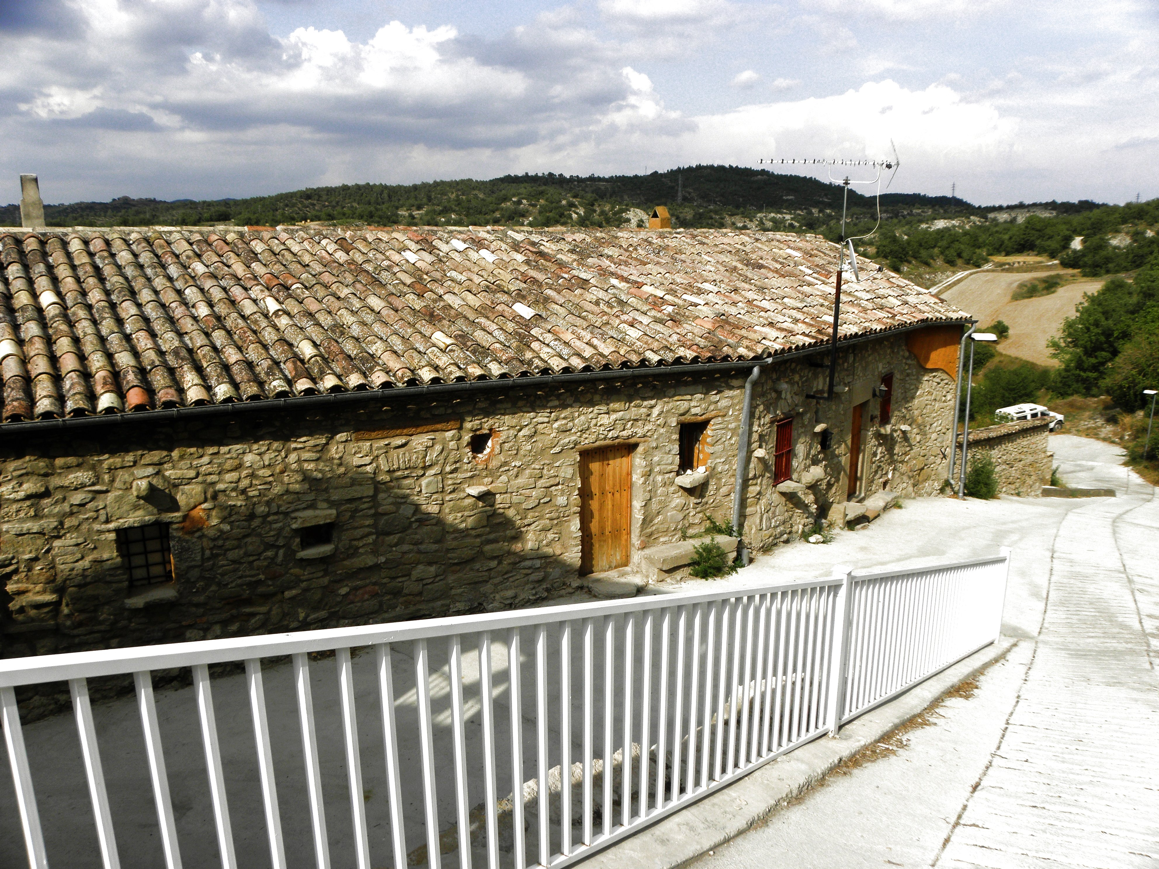 Enfesta (La Molsosa, Solsonès). La pujada al castell